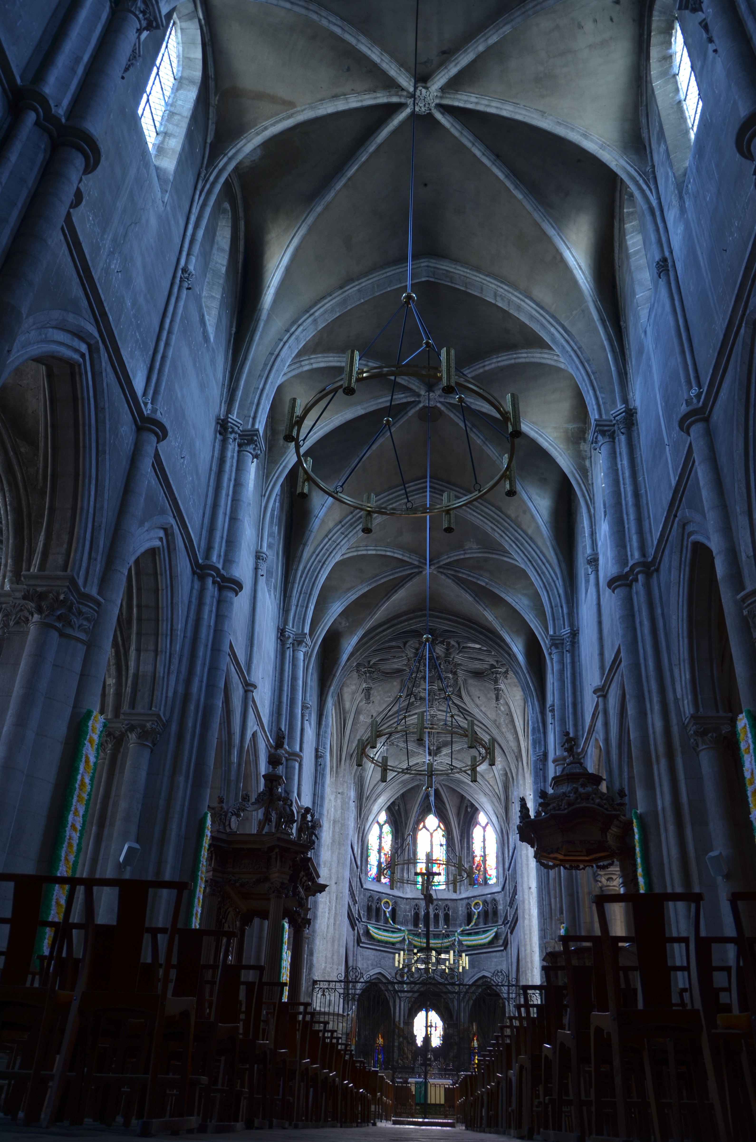 La basilique St Jean Baptiste de Chaumont, Haute-Marne, Champagne-Ardennes, France